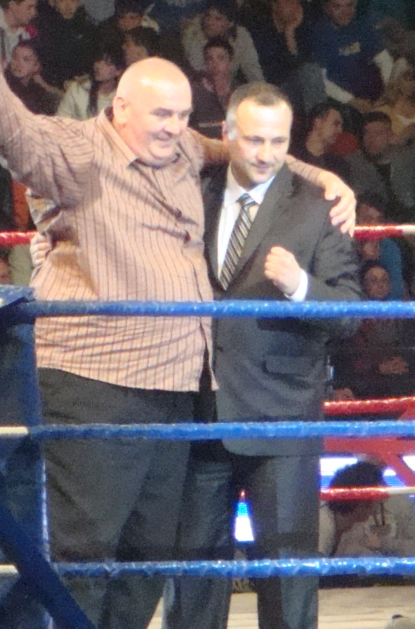 Draženko Ninić (desno)